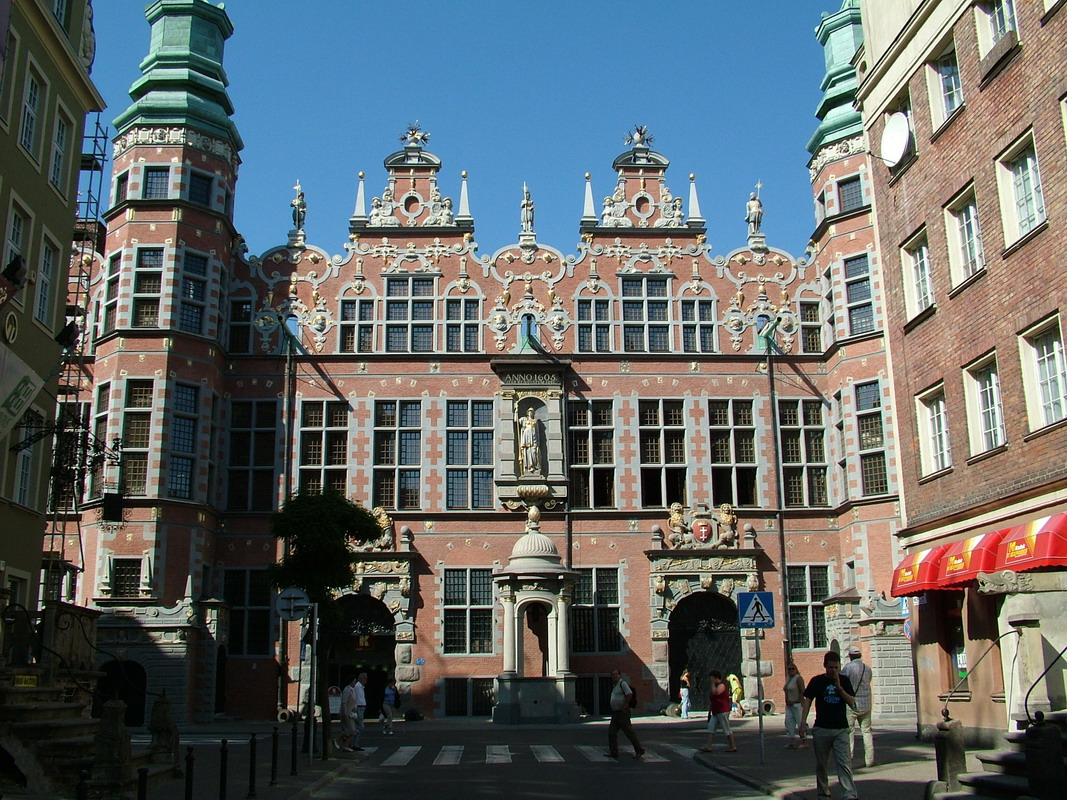 Gdańsk Główne Miasto, Targ Węglowy - Wielka Zbrojownia ze studnią, obecnie ASP, 1602-1605 (widok z ulicy Piwnej)